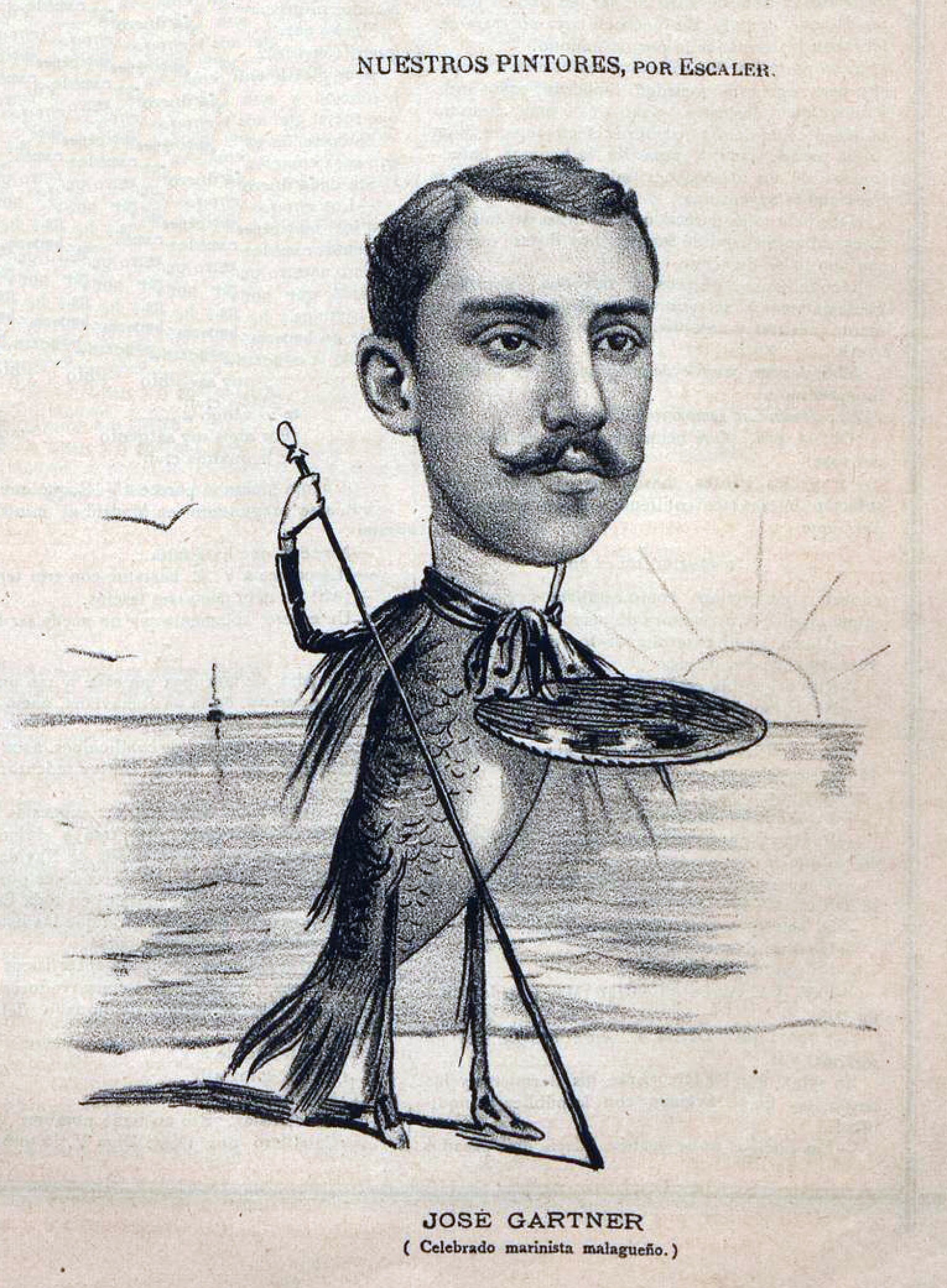 José Gartner.